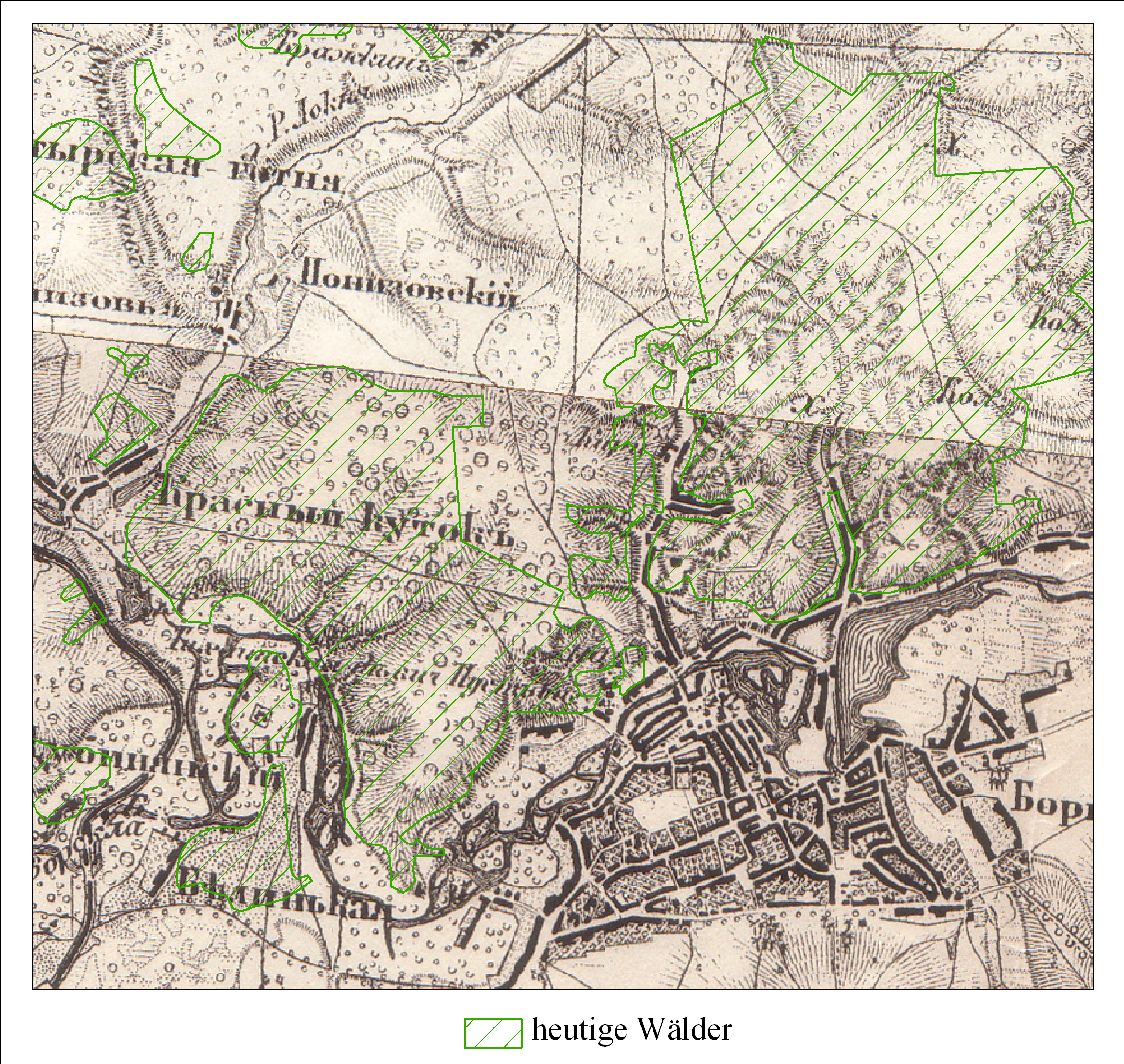 Лес на Ворскле и его окрестности в 19 веке (карта Шуберта)